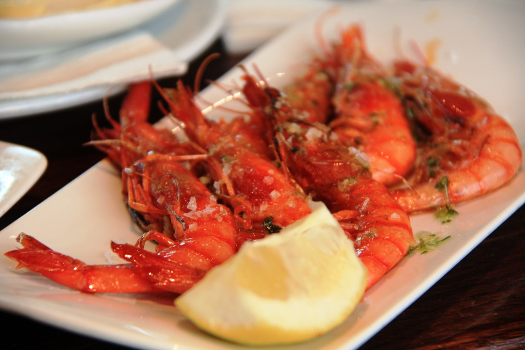 Gambas rojas